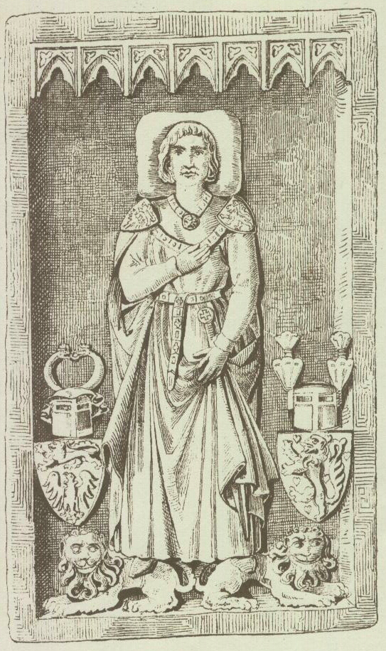 Bildunterschrift: Grabstein von Graf Herrmann V. dem Laien von Orlamuende / Herrn zu Weimar / gest. nach dem 12. Mai 1319 zu Salfeld